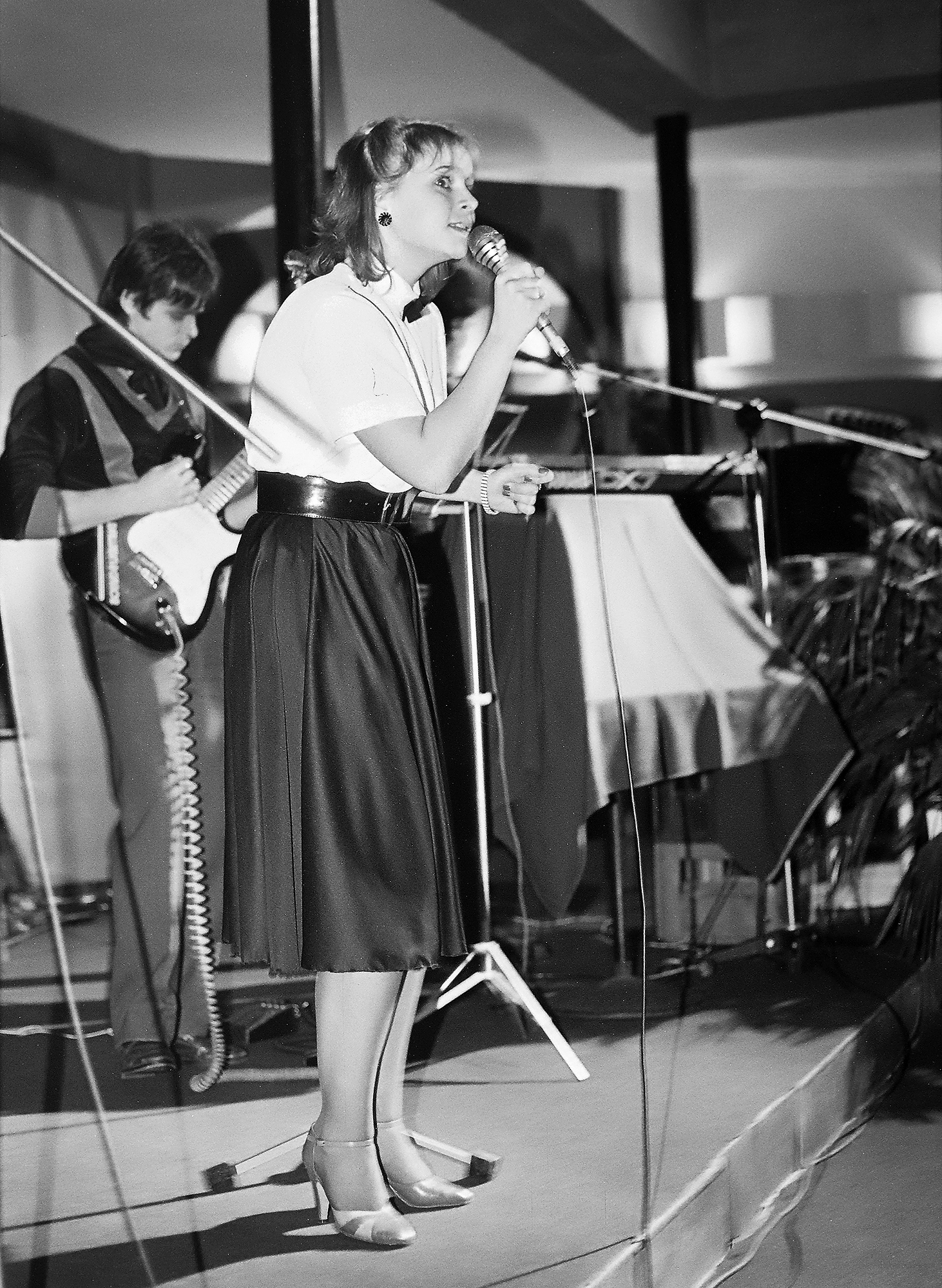 Thea Paluoja, endine laulja ja praegune lauluõpetaja 85